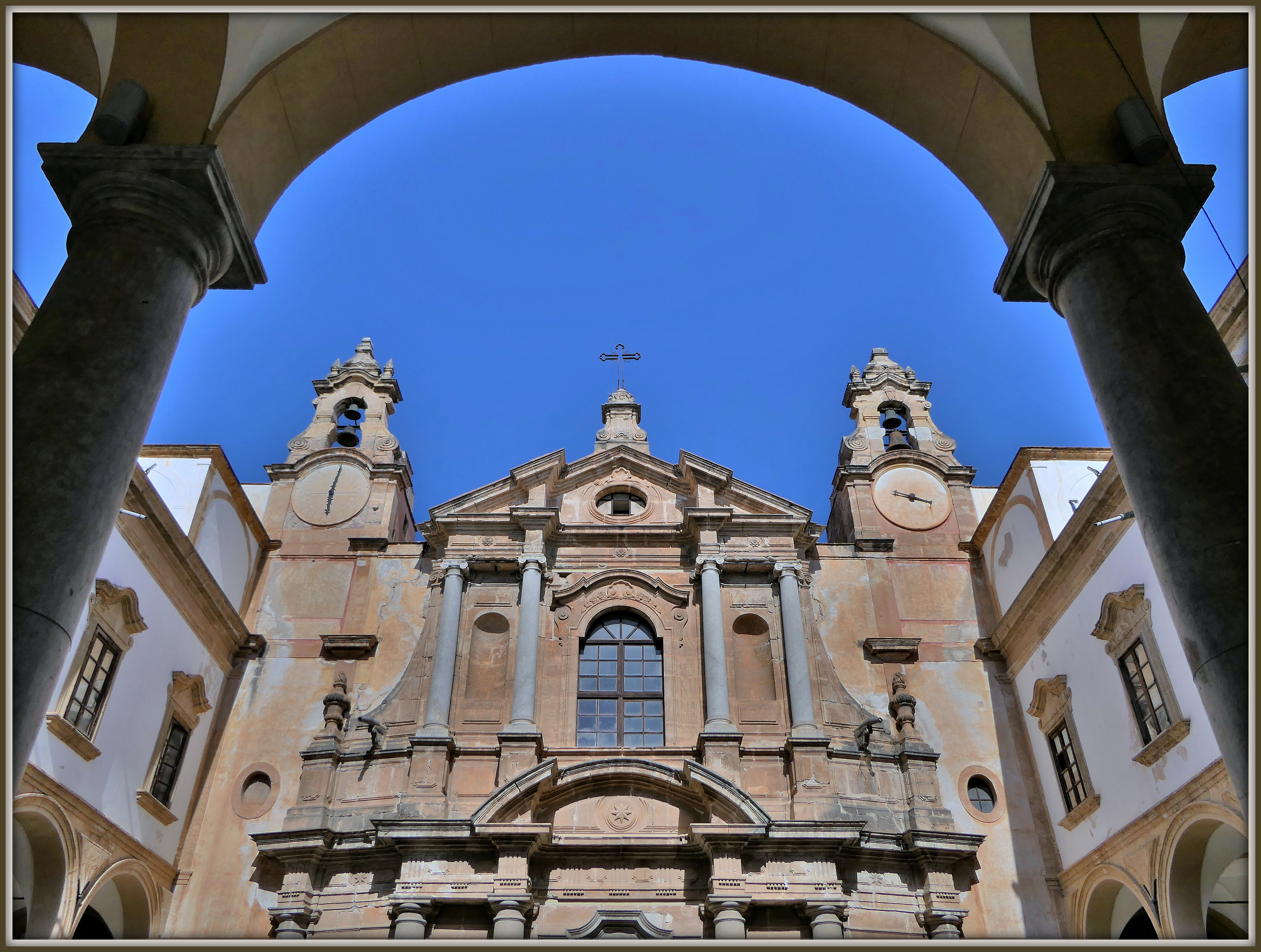 Albergo dei Poveri (Palermo) Unglaublich - aber das war tatsächlich als Armenhaus konzipiert - die Fassade sollte wohl darüber täuschen, was dahinter vorging. Die Armen haben keinesfalls in Luxus in einem Palast gelebt - das ganze war wohl mehr ein Knast.